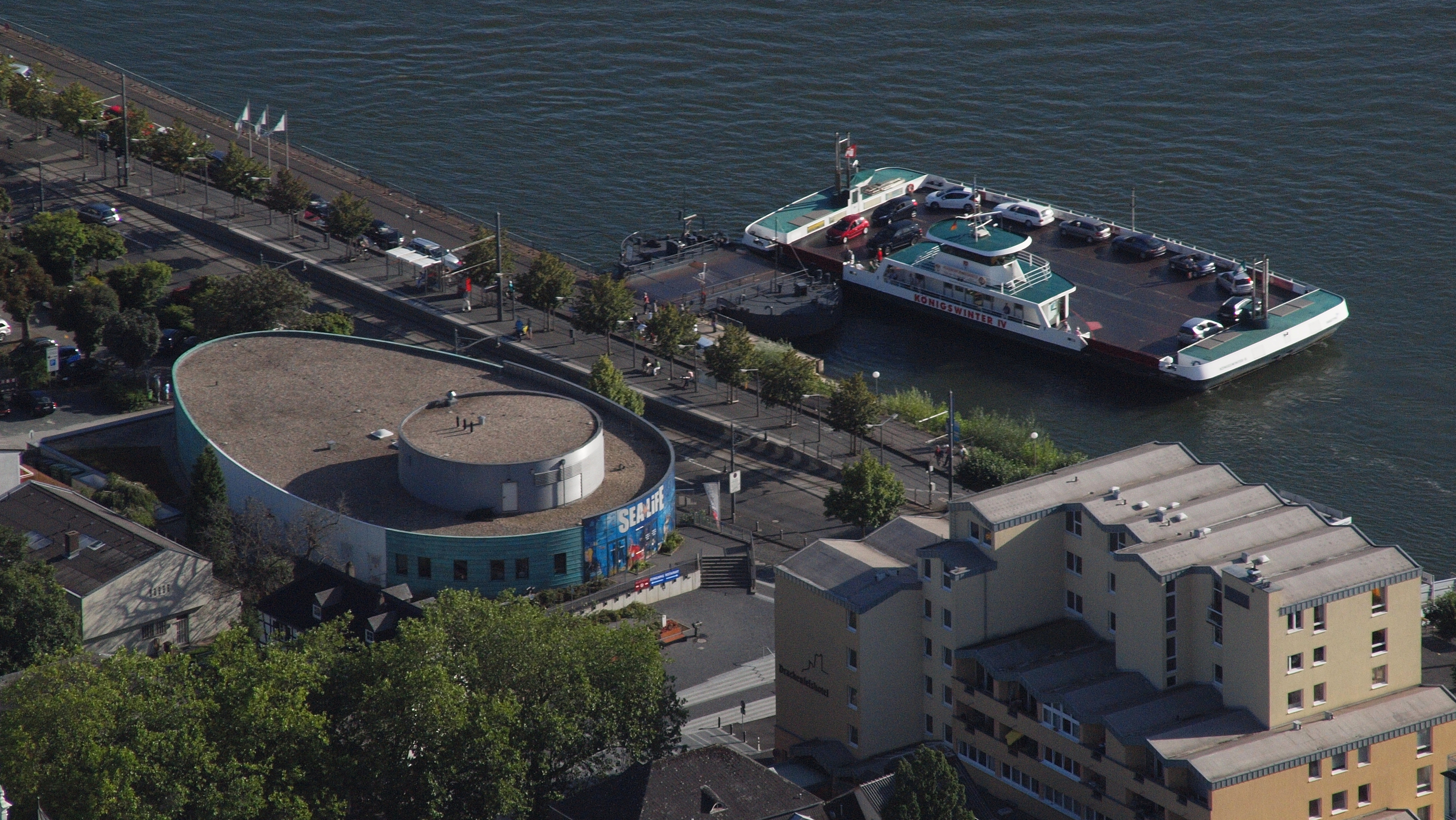 Königswinter, Sea Life und Rheinfähre: Luftaufnahme